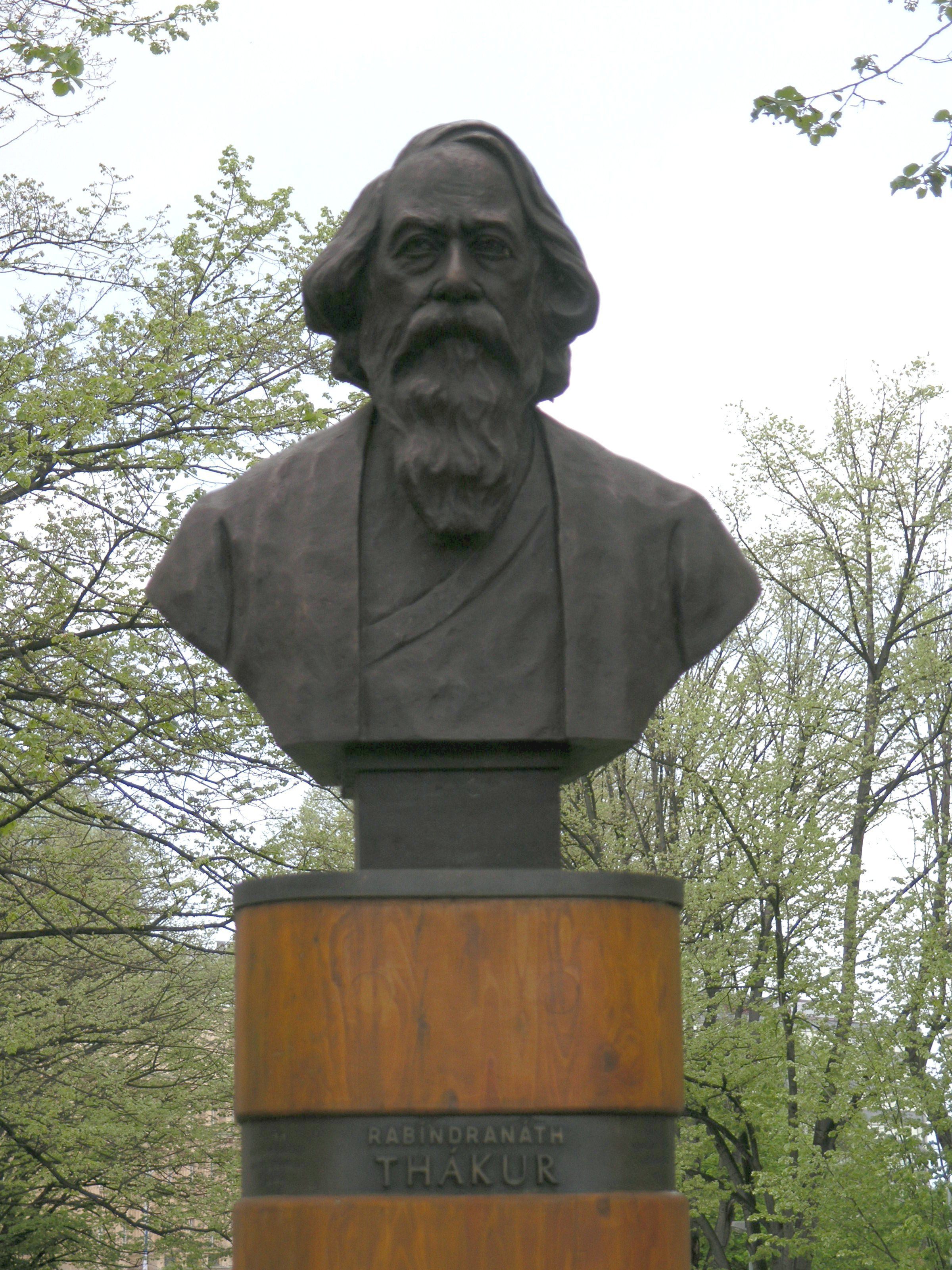 Praha, Dejvice - Thákurova busta v Thákurově ulici